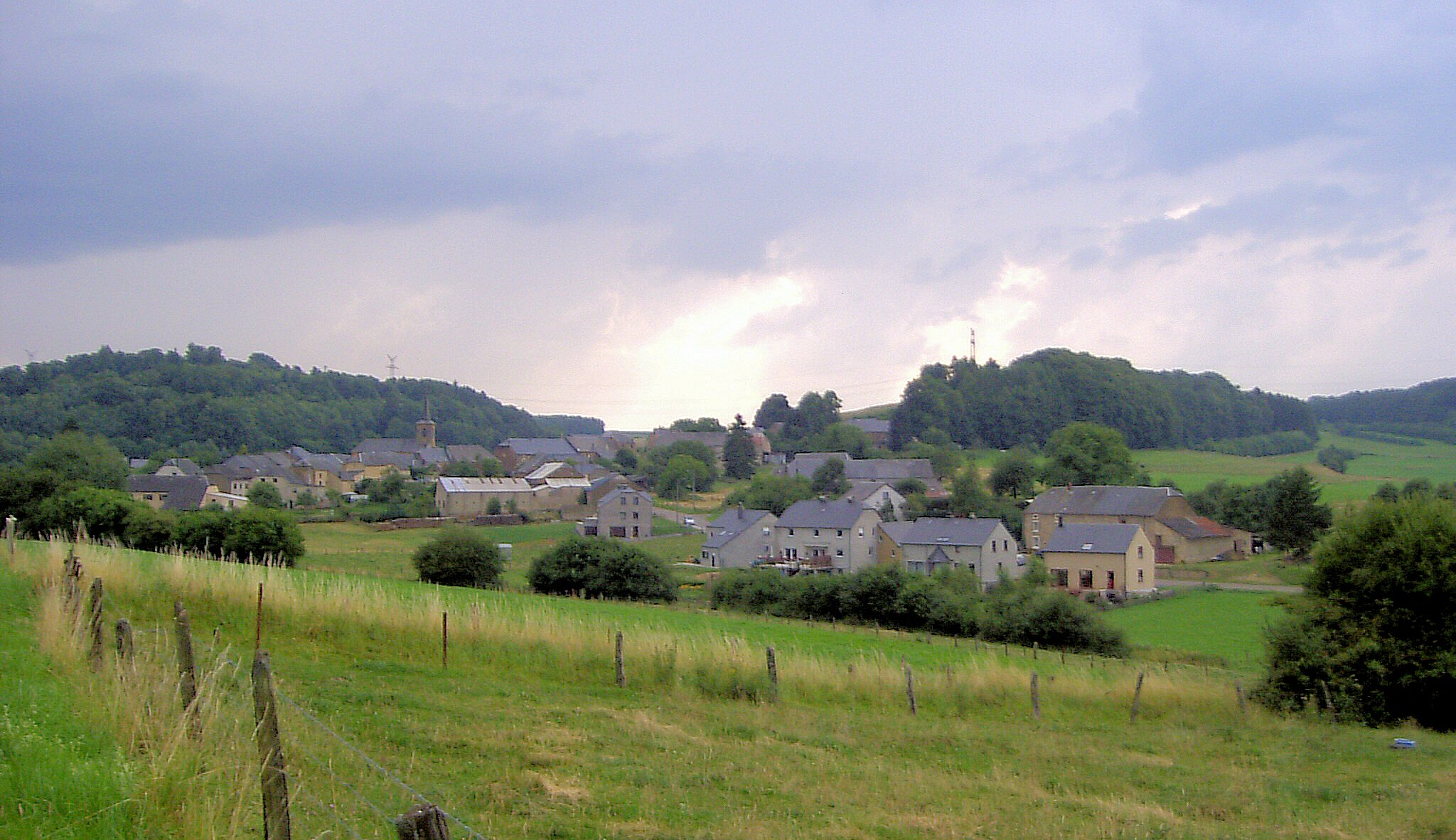 Bébange, village de la commune belge de Messancy